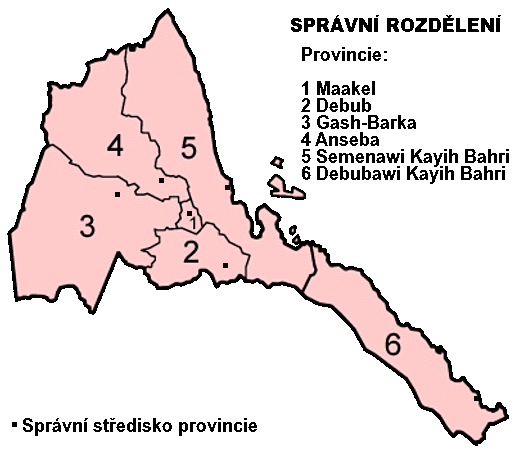 Eritrejské provincie.